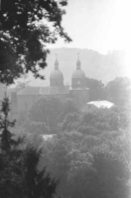 Вид на церкву у Струсові (Теребовлянський район Тернопільської області) від церкви в с. Варваринці.